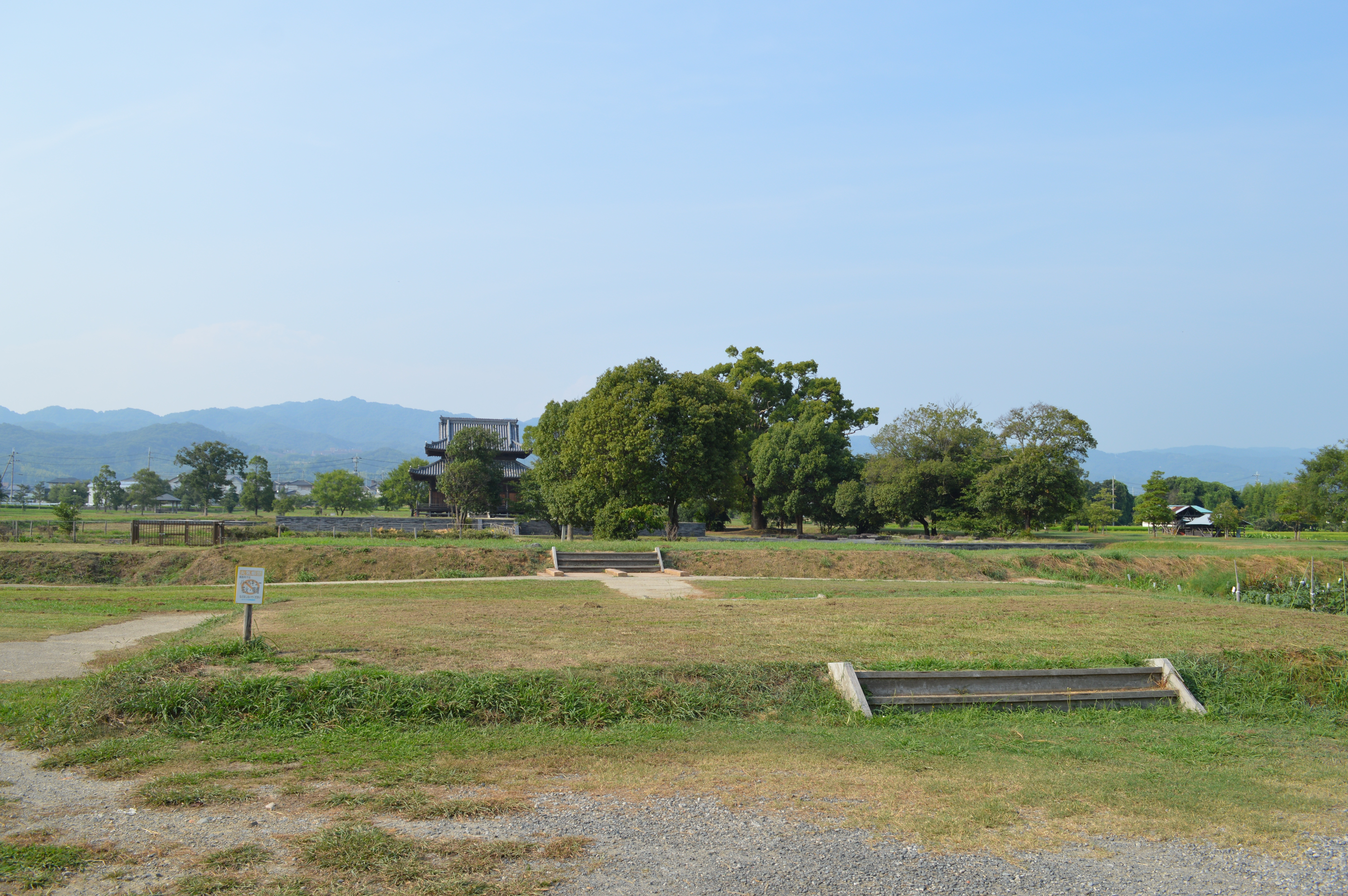 紀伊国分寺 正面 (南門跡と中門跡)